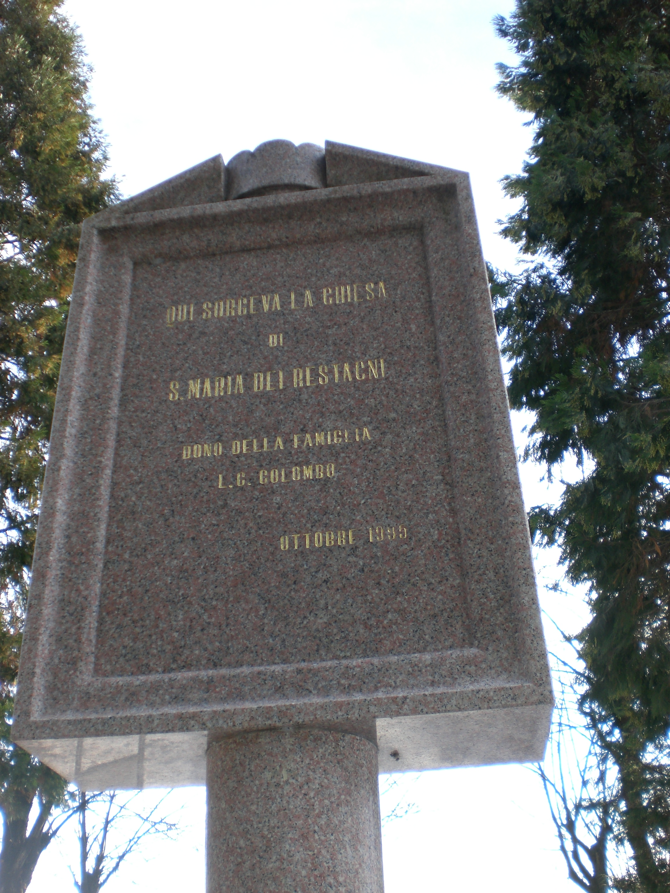 Targa in memoria della chiesa demolita si Santa Maria dei Restagni (Borsano, Busto Arsizio)